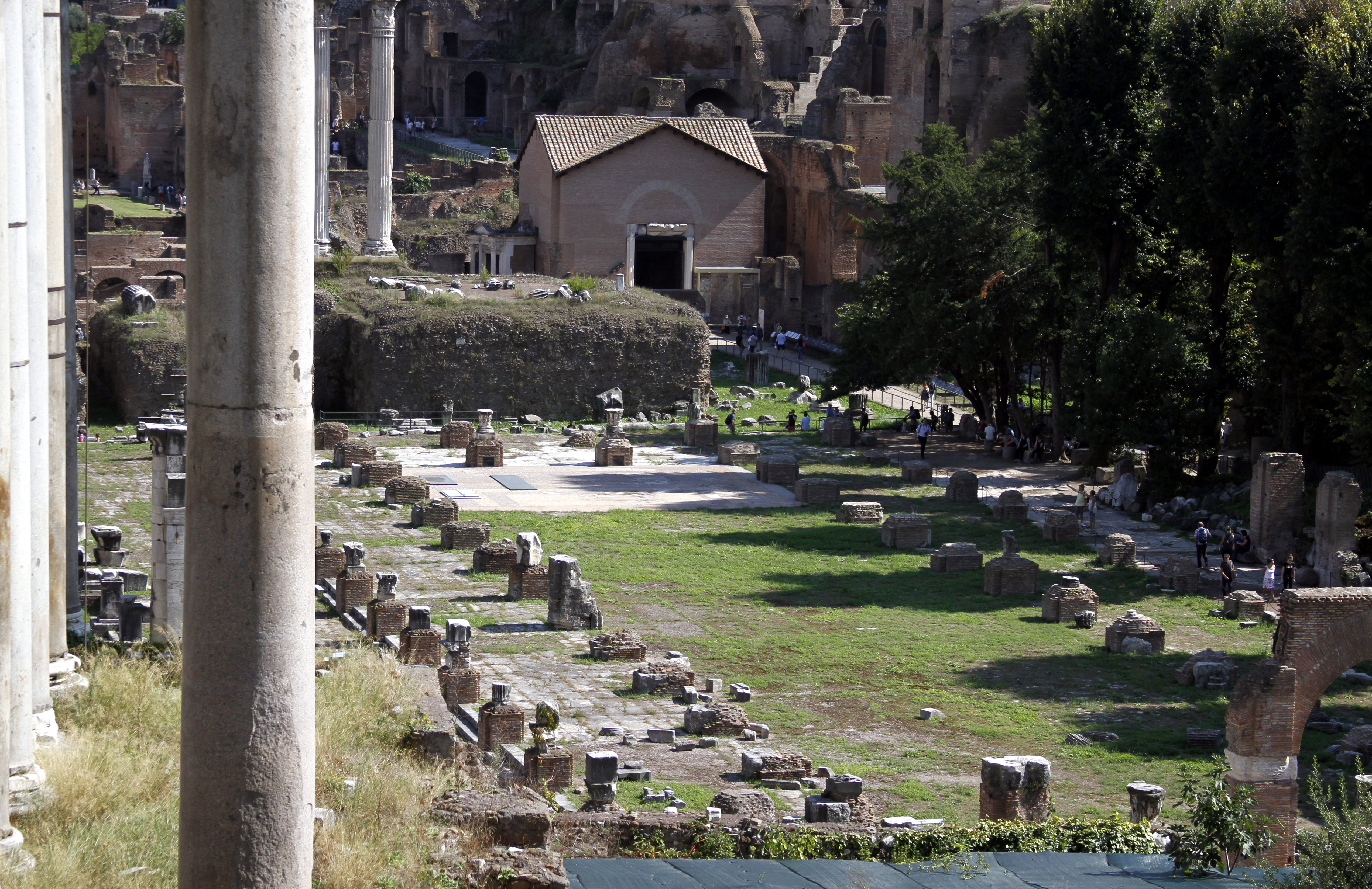 Roman Forum - Rome